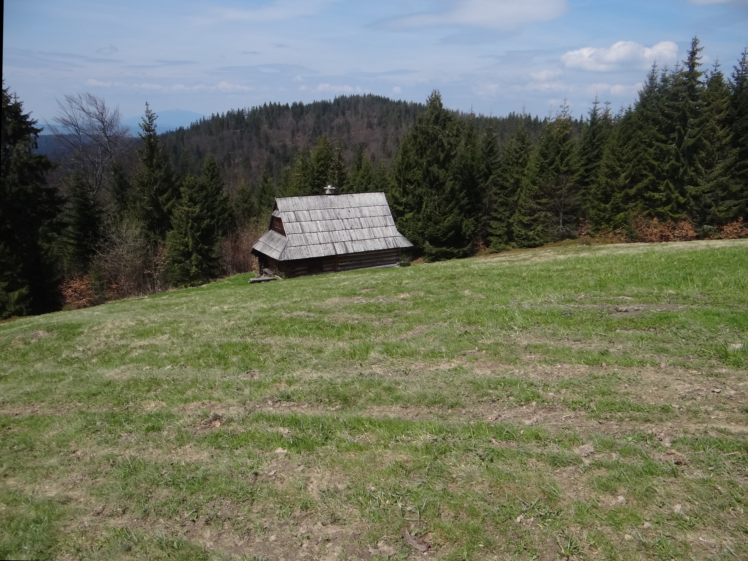 Polana Jaworzyna Obidowska na Turbaczu